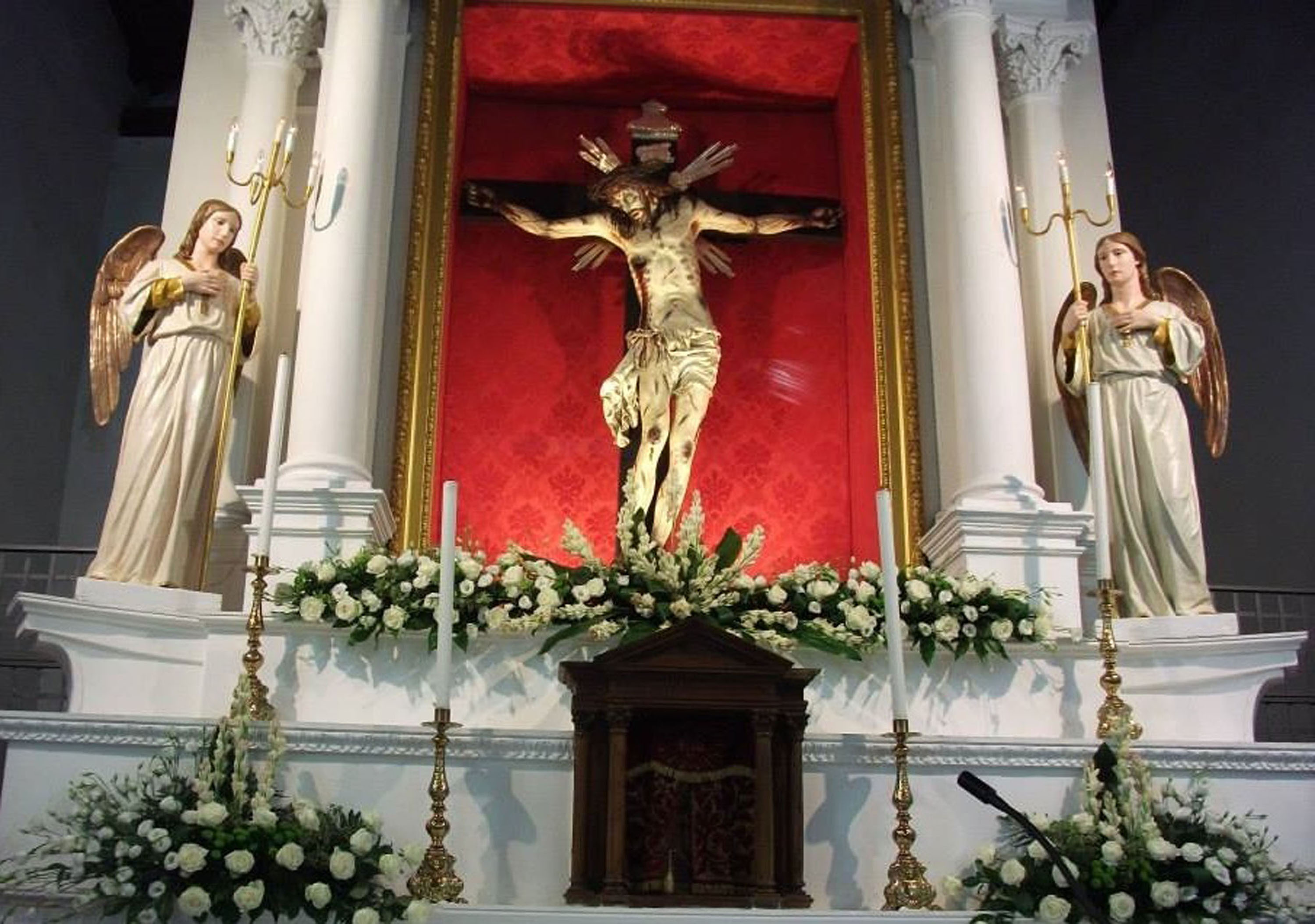 Il Crocifisso ligneo del XVII secolo, collocato nell'altare maggiore all'interno dell'omonima chiesa a Palmi.